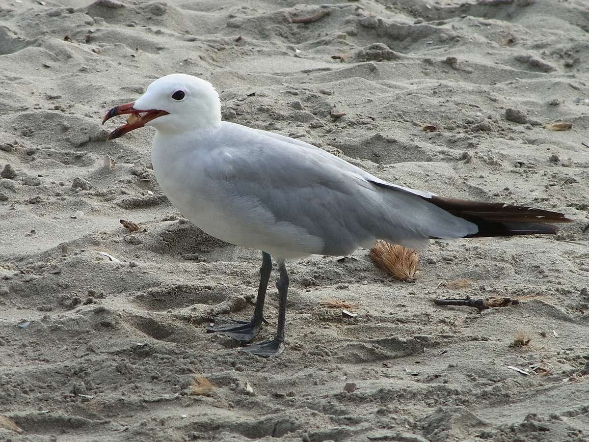 Korallenmöwe (Ichthyaetus audouinii) an einem Badestrand (Sant Tomás / Menorca)